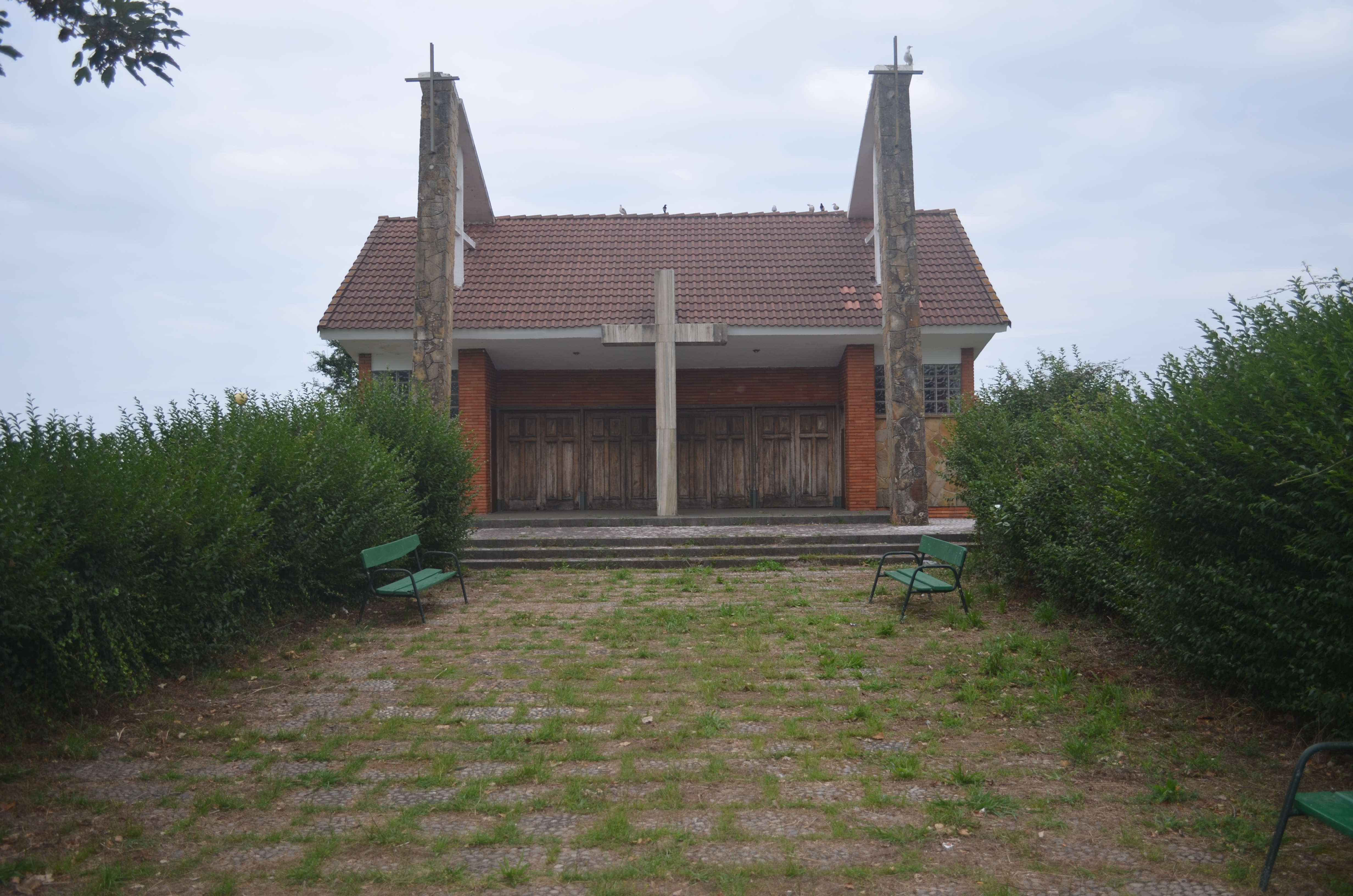 Capilla de Perlora, en Carreño, Asturias